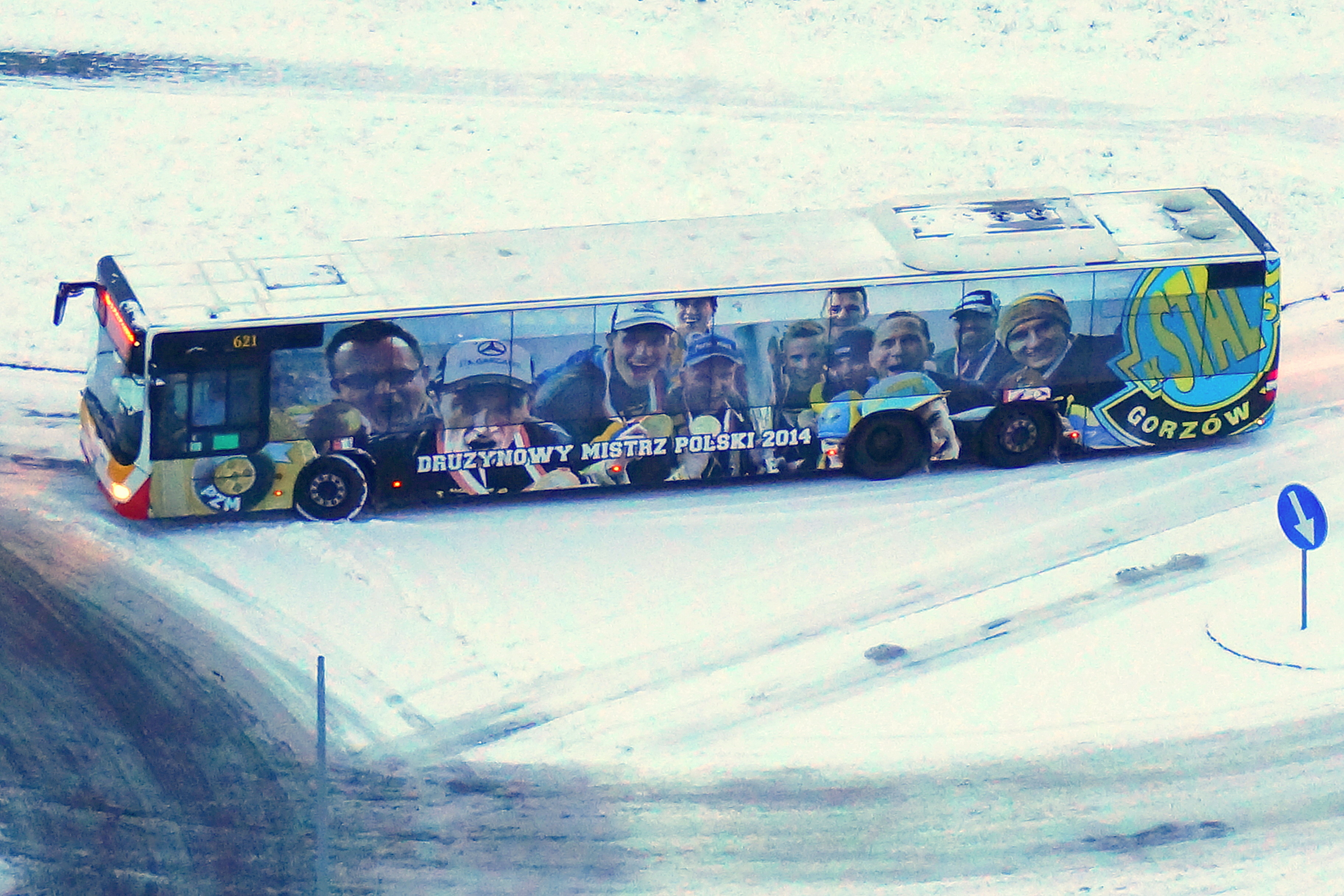 Gorzów Wlkp. Autobus komunikacji miejskiej w wystroju upamiętniającym zdobycie tytułu Drużynowego Mistrza Polski na Żużlu w 2014 r. przez Stal Gorzów